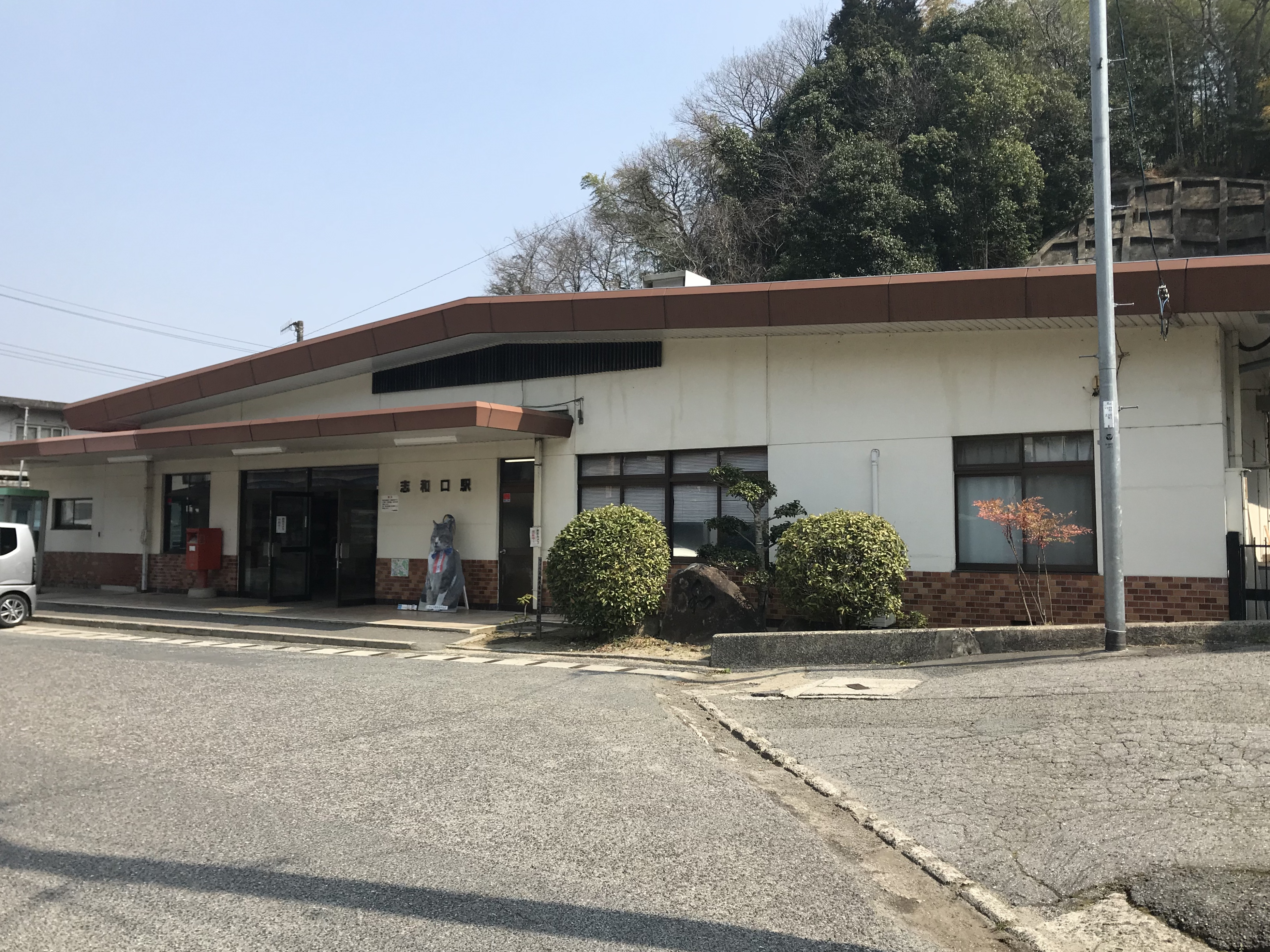 志和口駅の駅舎